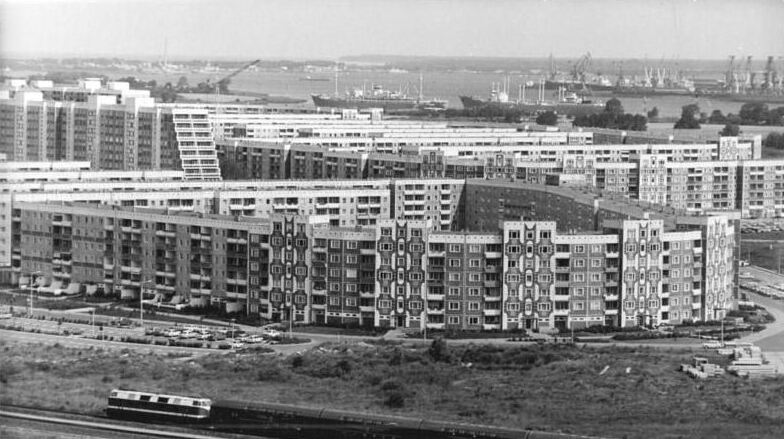 Rostock, Schmarl, Neubaugebiet, Wohnblocks ADN-ZB Sindermann 14.5.1981 Rostock-In den vergangenen fünf Jahren wurden im Küstenbezirk rund 37000 Neubauwohnungen bezogen. Die stadtbauliche Komposition der Neubaugebiete Rostocks fügt sich harmonisch in die Landschaft ein. Hier ein Blick auf das Neubaugebiet Rostock-Schmarl. -siehe dazu auch die Fotos Z0514-24 u. 25N